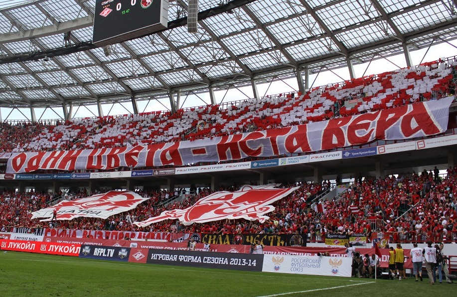 Перфоманс, посвященный дружбе с болельщикам "Црвены Звезды"